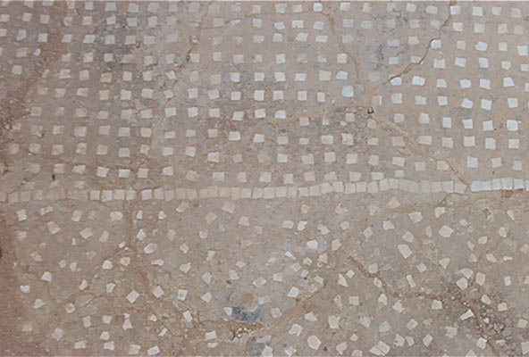 Fragment de mosaïque punique dite pavimenta punica, quartier Hannibal, Byrsa, Carthage (Tunisie)